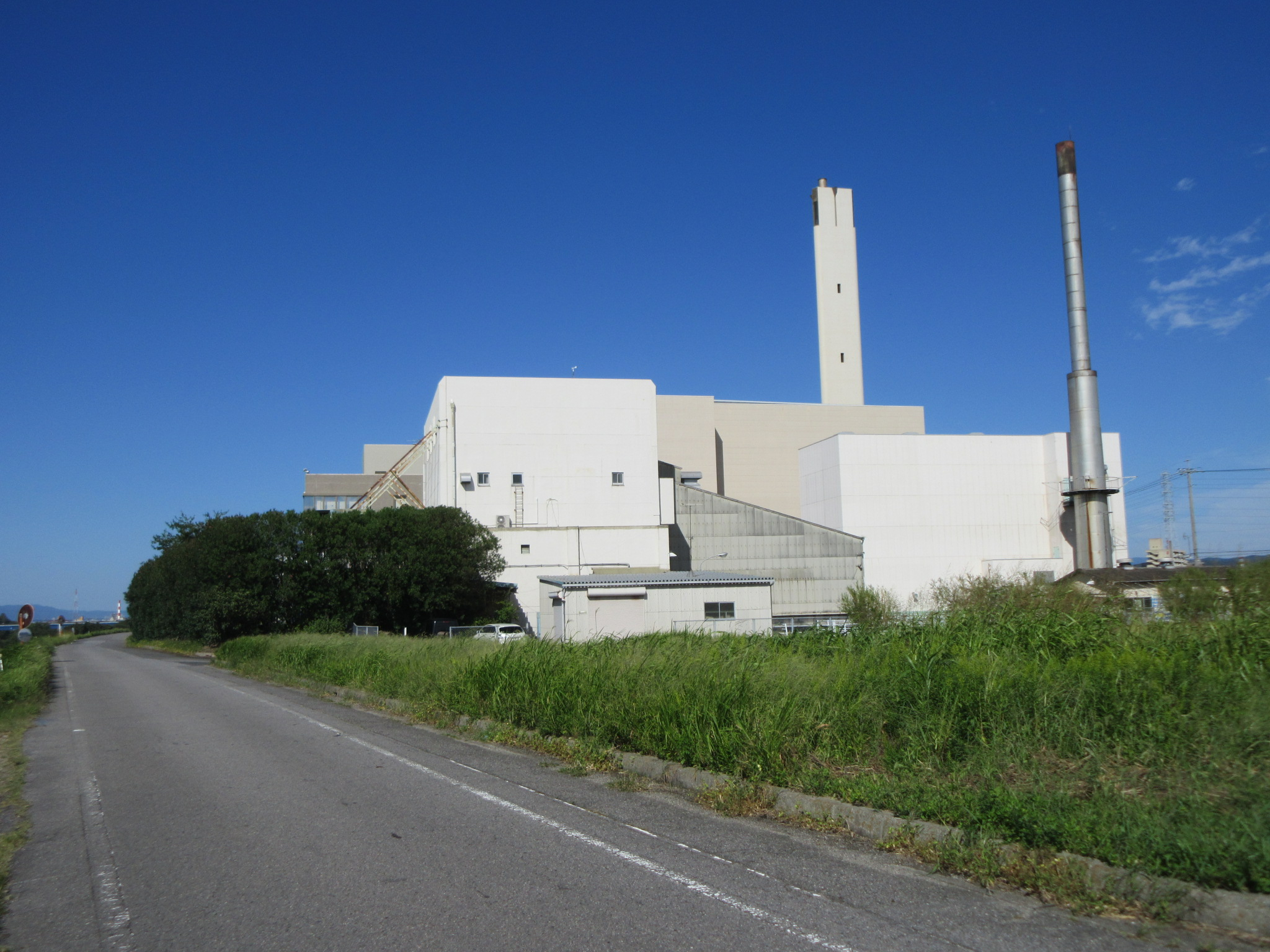 八帖クリーンセンター（岡崎市八帖南町）